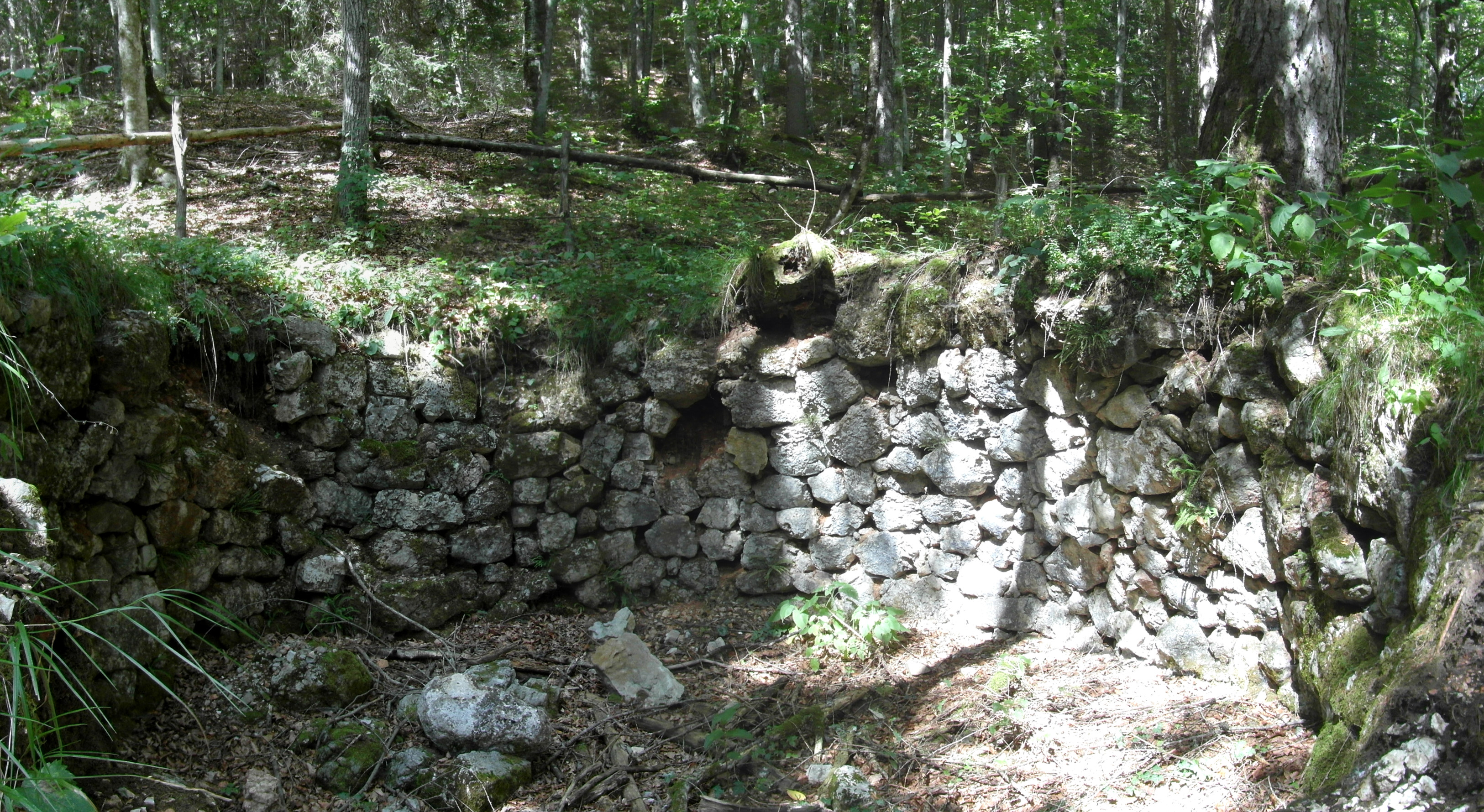 Calchera in val di Sella - Pergine Valsugana - Trentino